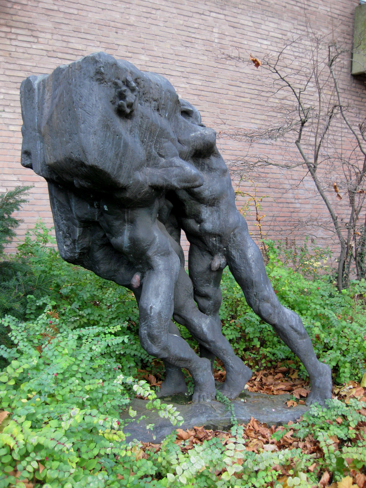 Bernd Altenstein: "Die Eingeschlossenen" (um 1974) in Osnabrück, Bronze